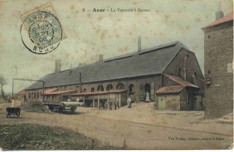 Anor verrerie à flacons